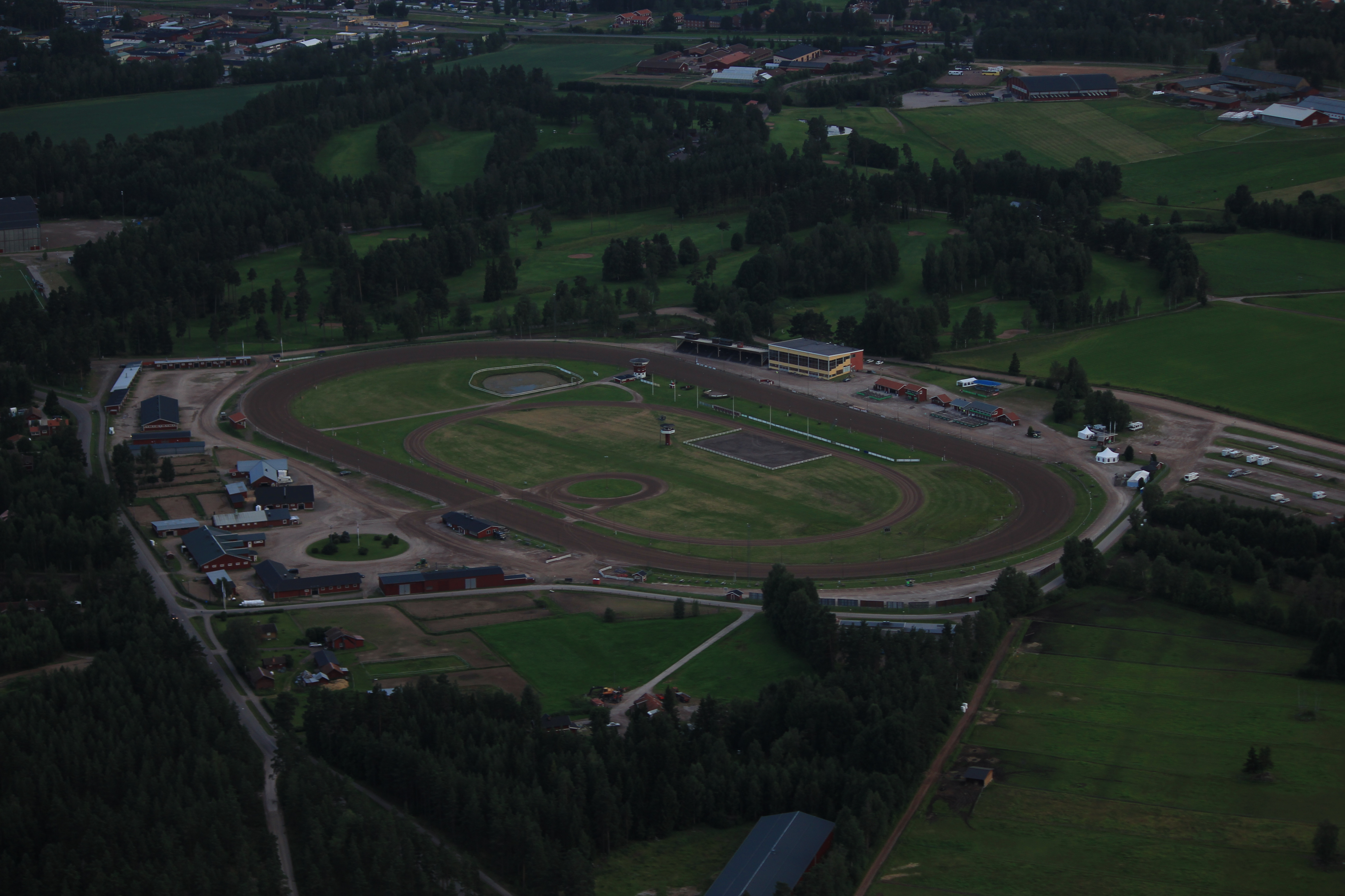 Flygfoto över Rättviks kommun, Dalarnas län, Sverige This aerial photograph has been approved for publishing by the Swedish Armed Forces with the ID: FMTM 10 830:11043 This tag does not indicate the copyright status of the attached work. A normal copyright tag is still required. See Commons:Licensing for more information.